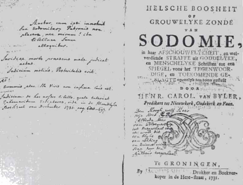 "Helsche boosheit of grouwelyke zonde van Sodomie". Het pamflet van dominee Henricus Carolinus van Bijler dat Rudolf de Mepsche aanzette tot het laten ophangen van 22 mensen die verdacht werden van 'sodomie' (homoseksaliteit) in 1731 in Zuidhorn (Groningen, Nederland)